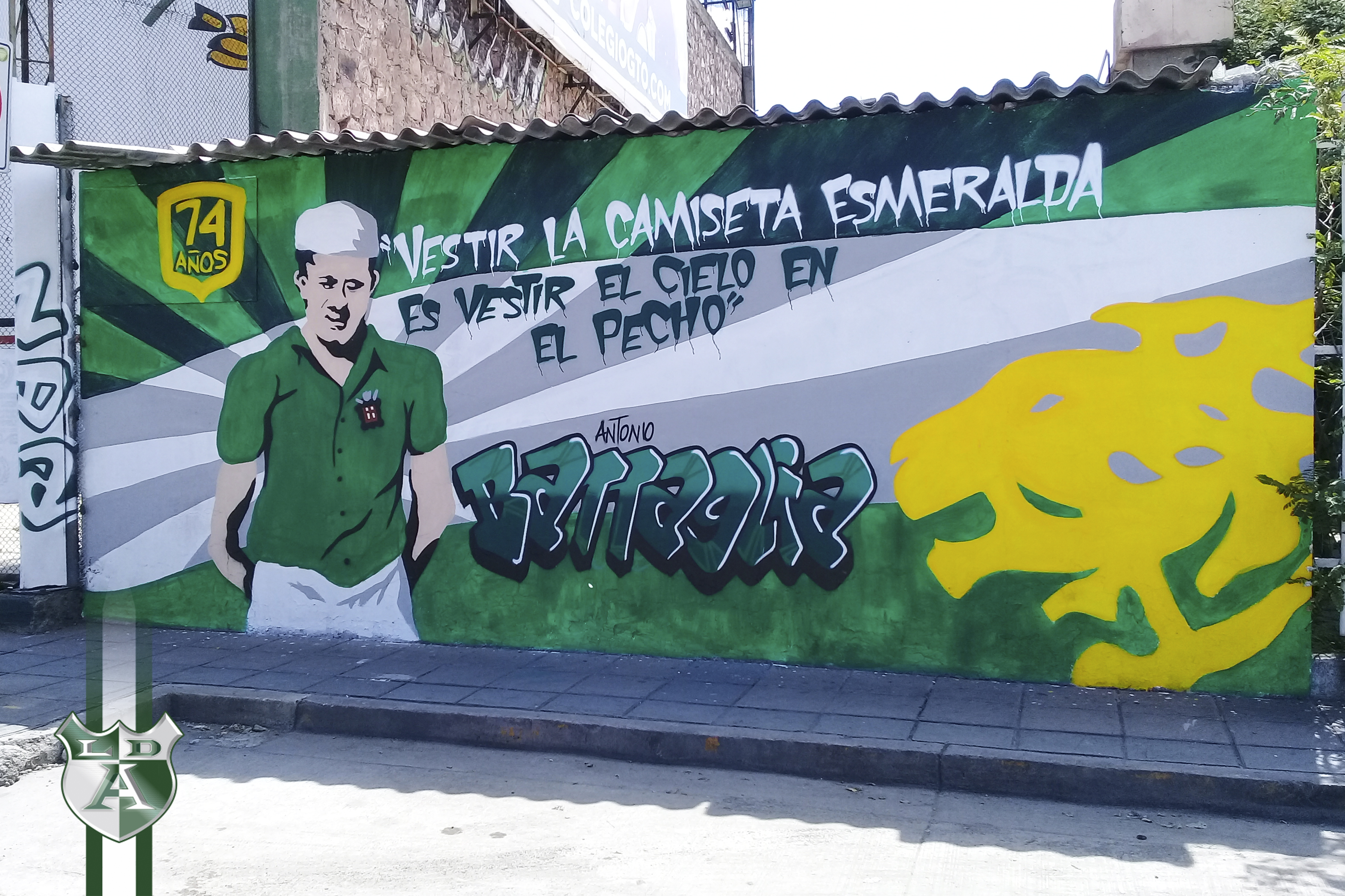 Graffiti dedicado al ex futbolista, en el 74 aniversario del Club León